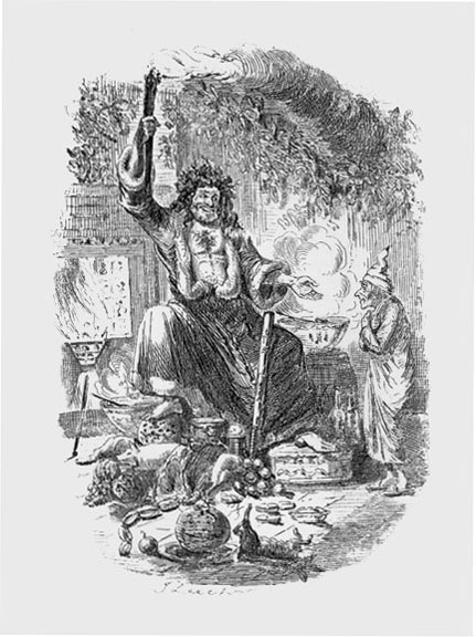 A Christmas Carol, The Second of The Three Spirits, John Leech, 1843, Wood engraving